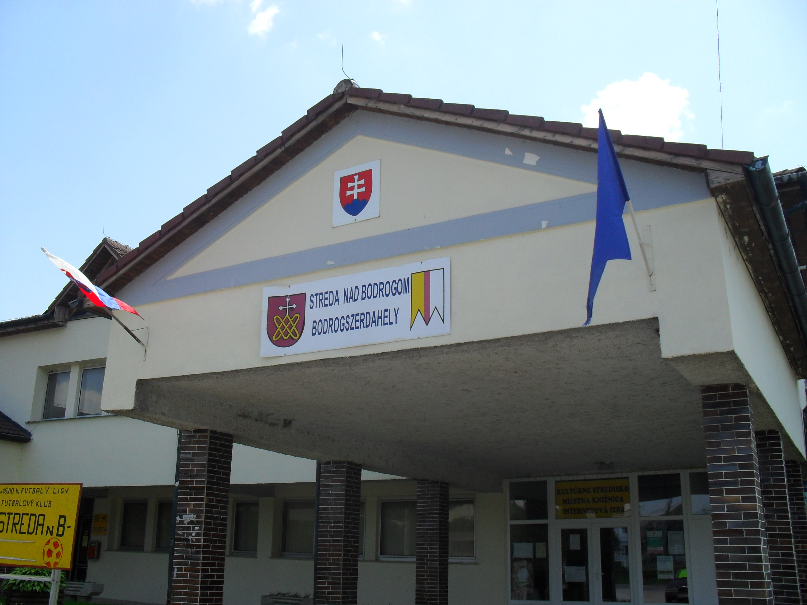 Bodrogszerdahely - kultúrház